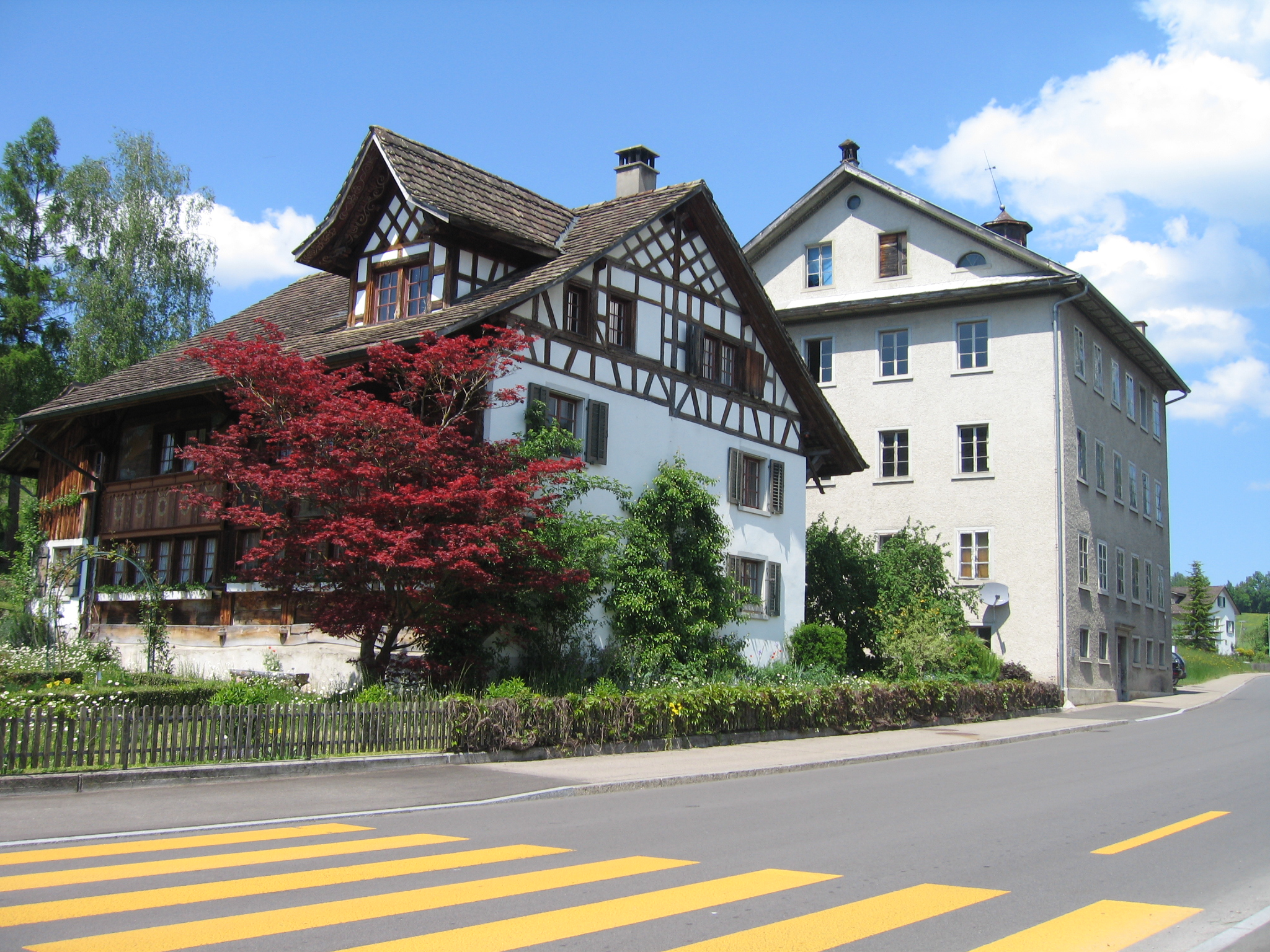 Wacht Ottikon: Das Dürsteler-Haus (heute Ortsmuseum) und dahinter die Seidenwinderei.